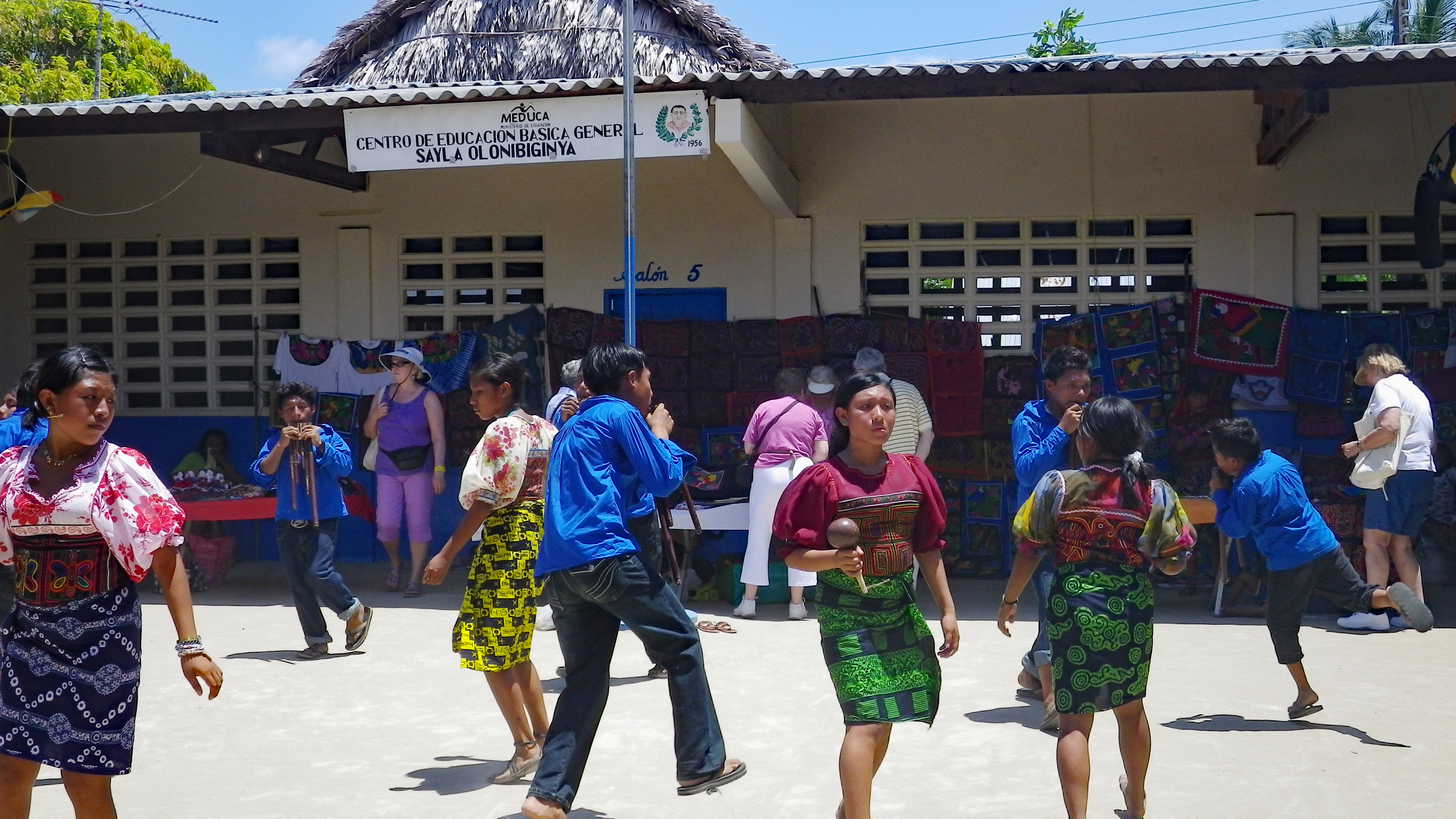 Danseurs indigènes en costume traditionnels